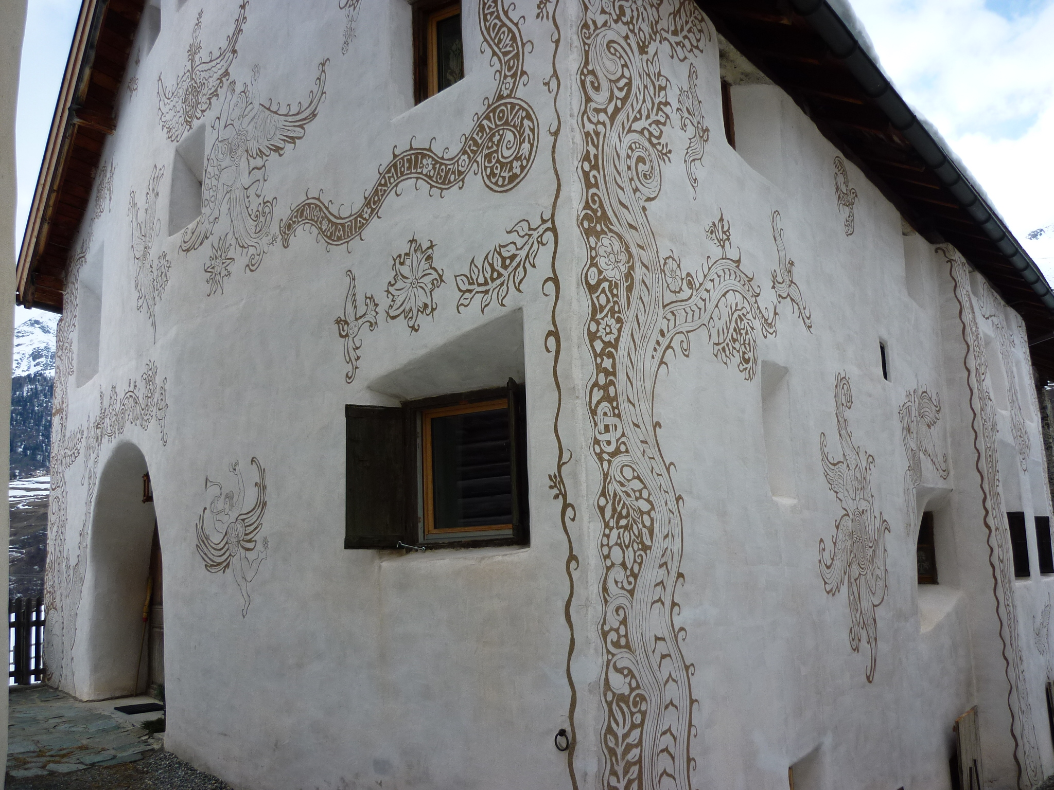 Haus Sur En, Ardez GR, Schweiz